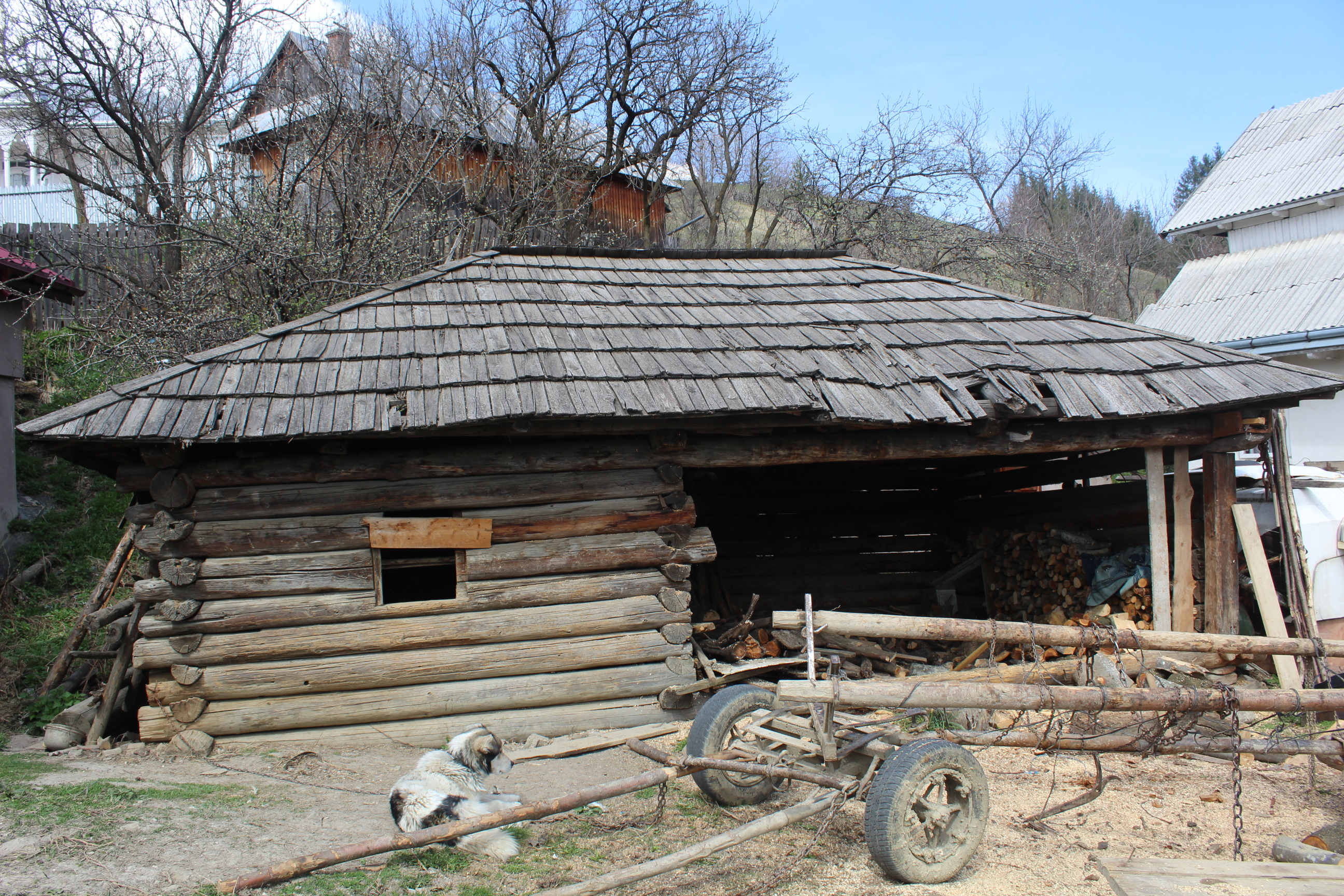 Brânzăria lui David Creangă